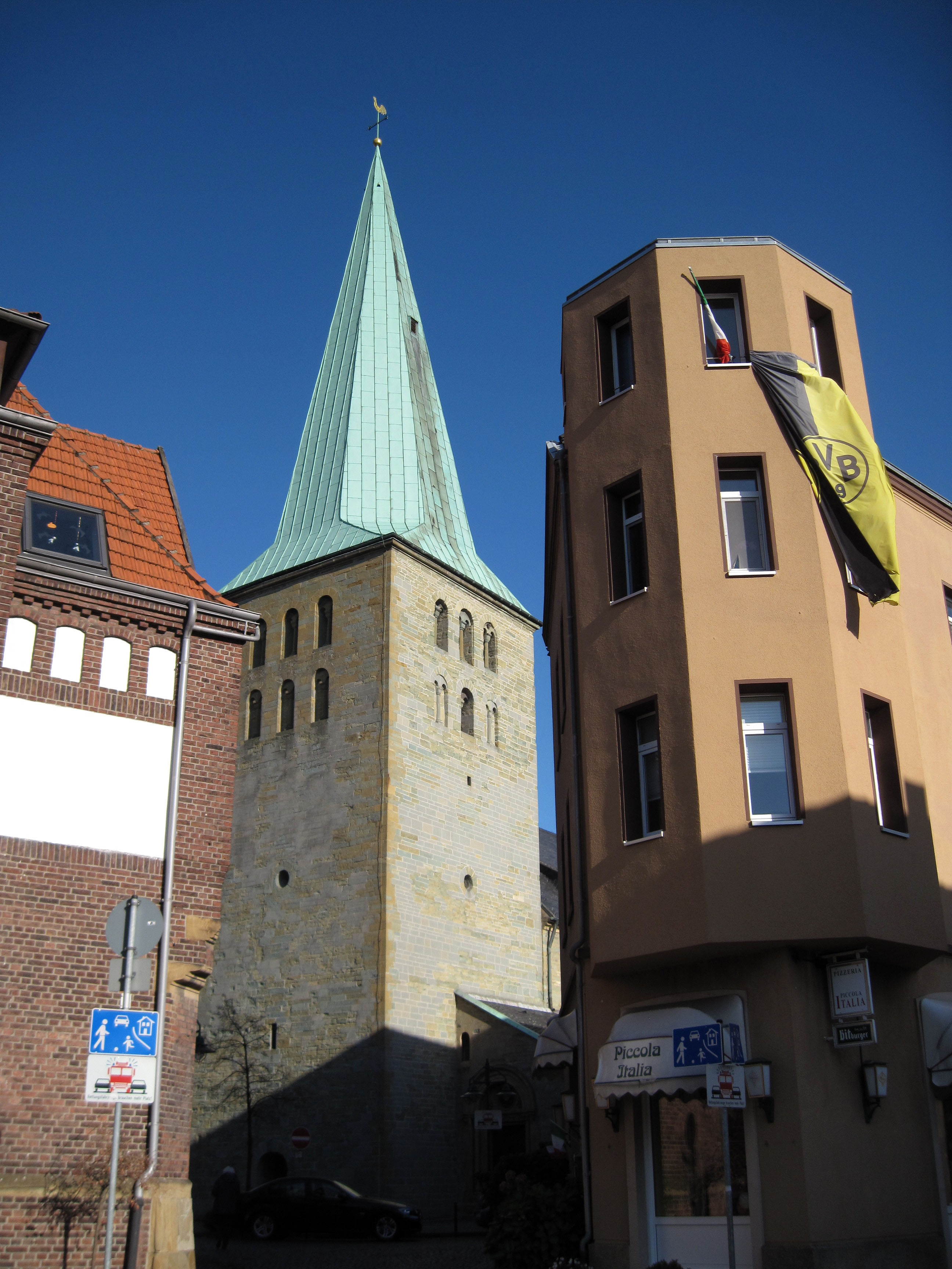 Hamm, Rhynern, Katholische Kirche St, Regina, Turmansicht 2